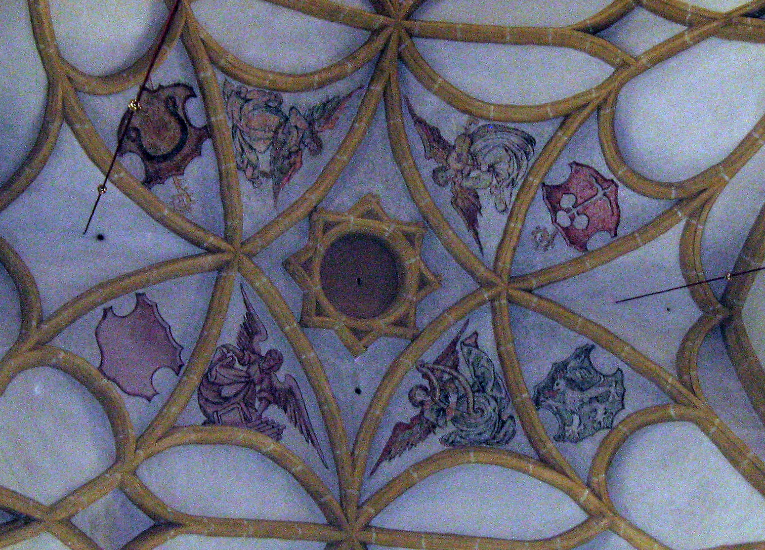 Deckenmalerei im Stift Göss